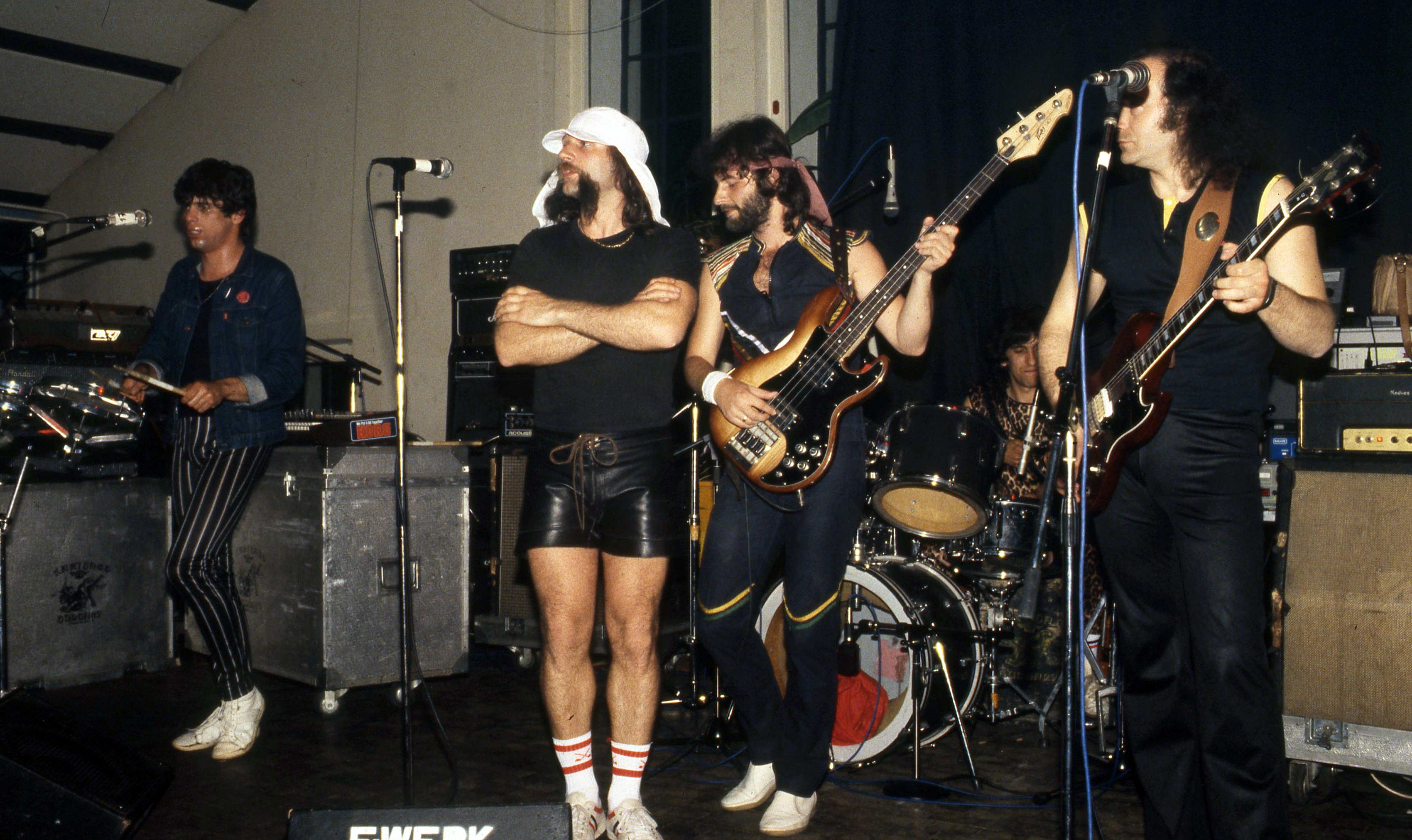 Karthago együttes, Takáts Tamás, Gidófalvy Attila, Kiss Zoltán Zéró, Kocsándi Miklós és Szigeti Ferenc.